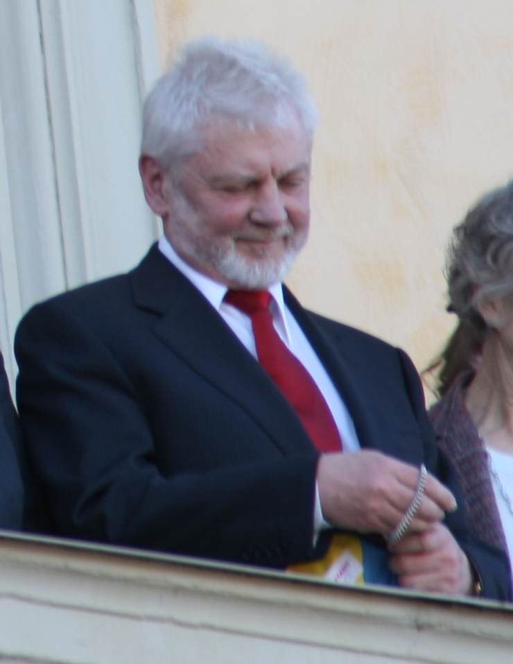 Rektorn kollar tiden